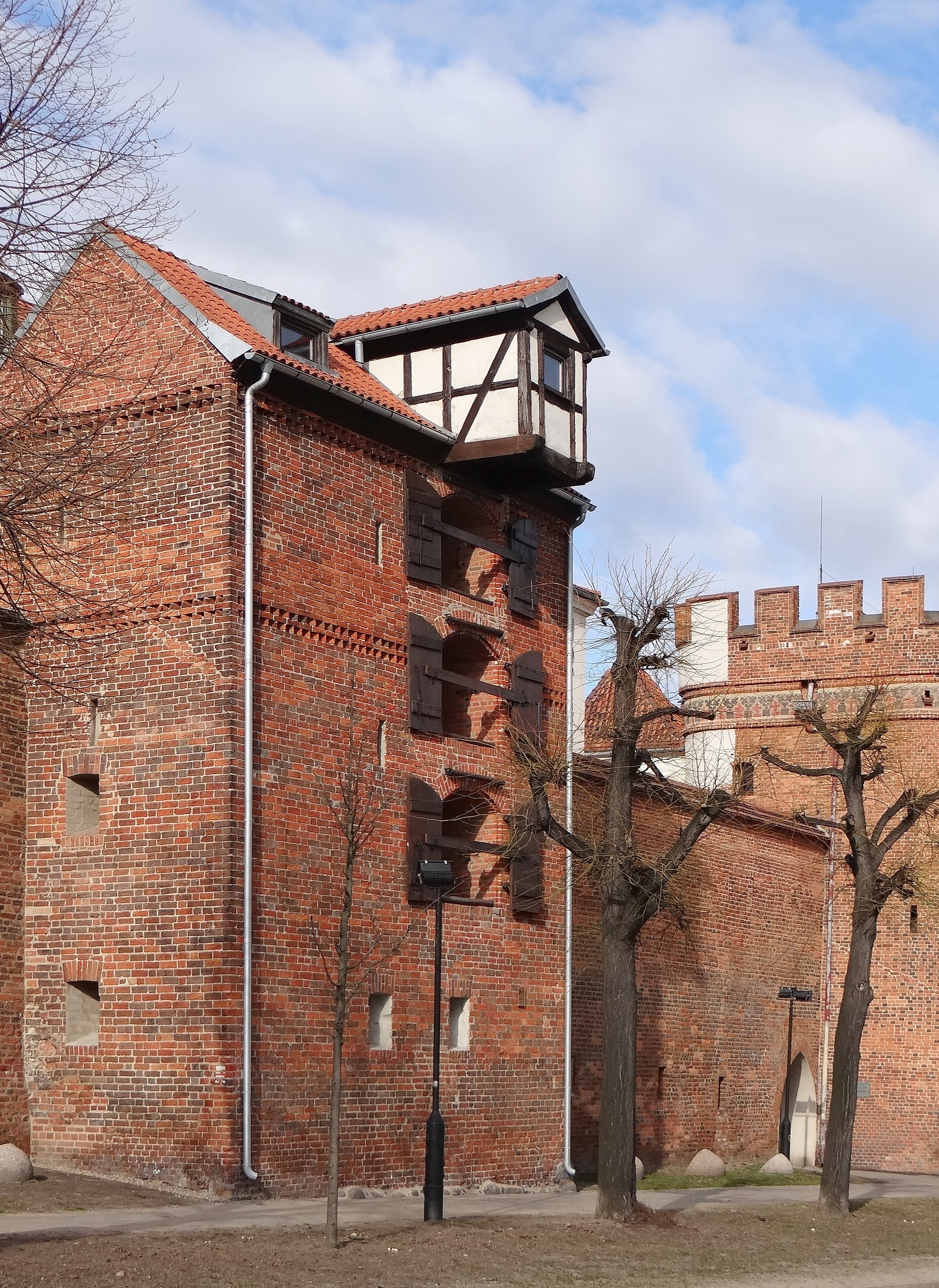 Toruń, Bulwar Filadelfijski 6 - baszta „Żuraw", k. XIII, XVI, XVII, 1823 (zabytek nr A/130 z 17.10.1929 i z 30.05.1996)